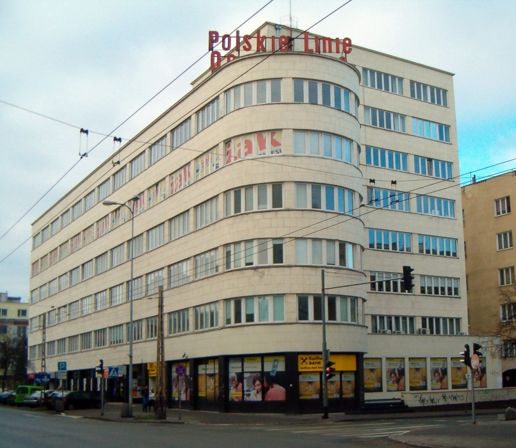 Gdynia Śródmieście, ul. 10 Lutego 24 - Siedziba Zakładu Ubezpieczeń i PLO ("Polskie Linie Oceaniczne")